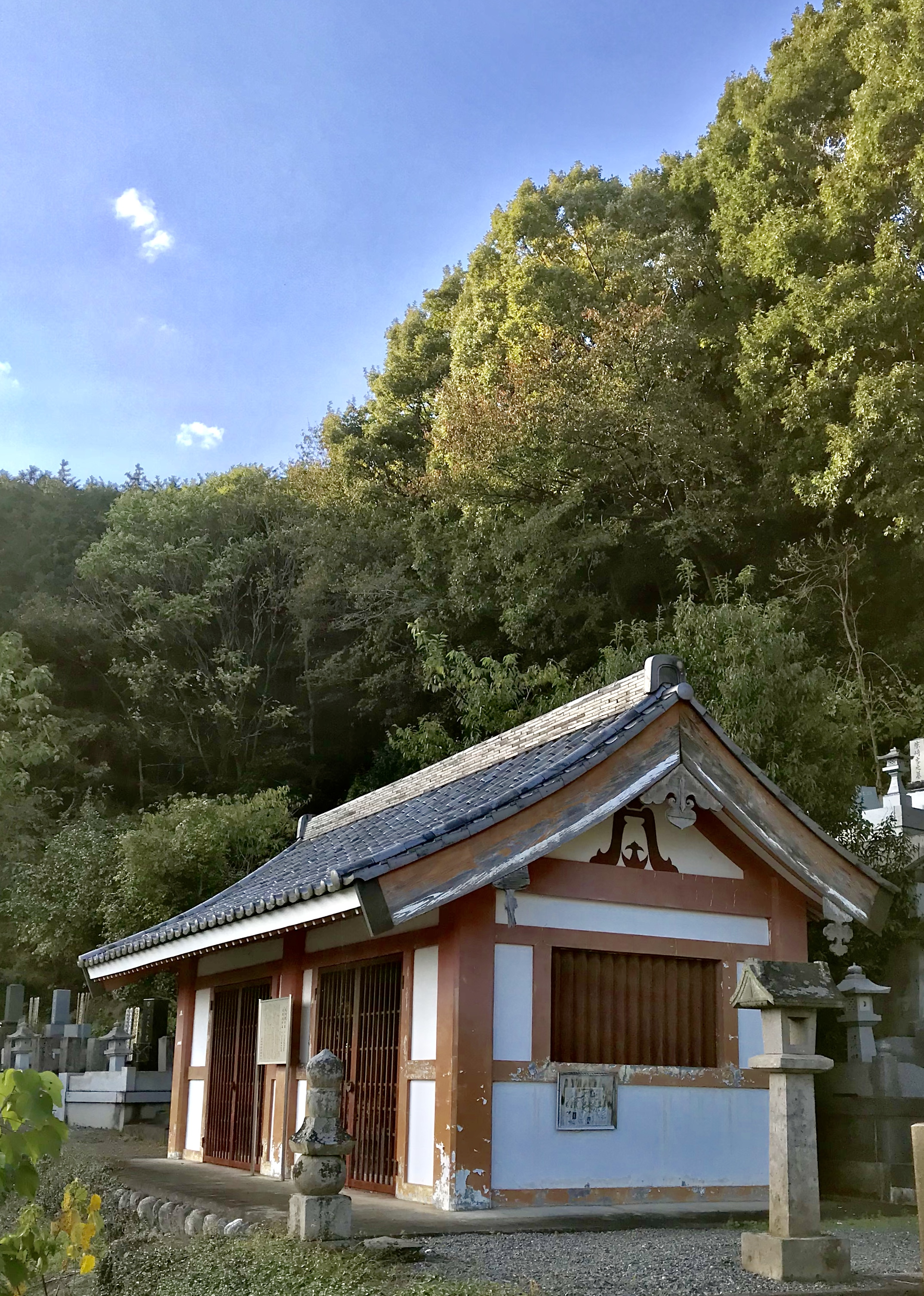 藤田康邦夫妻と北条氏邦夫妻の墓を保存するための建屋。埼玉県指定史跡